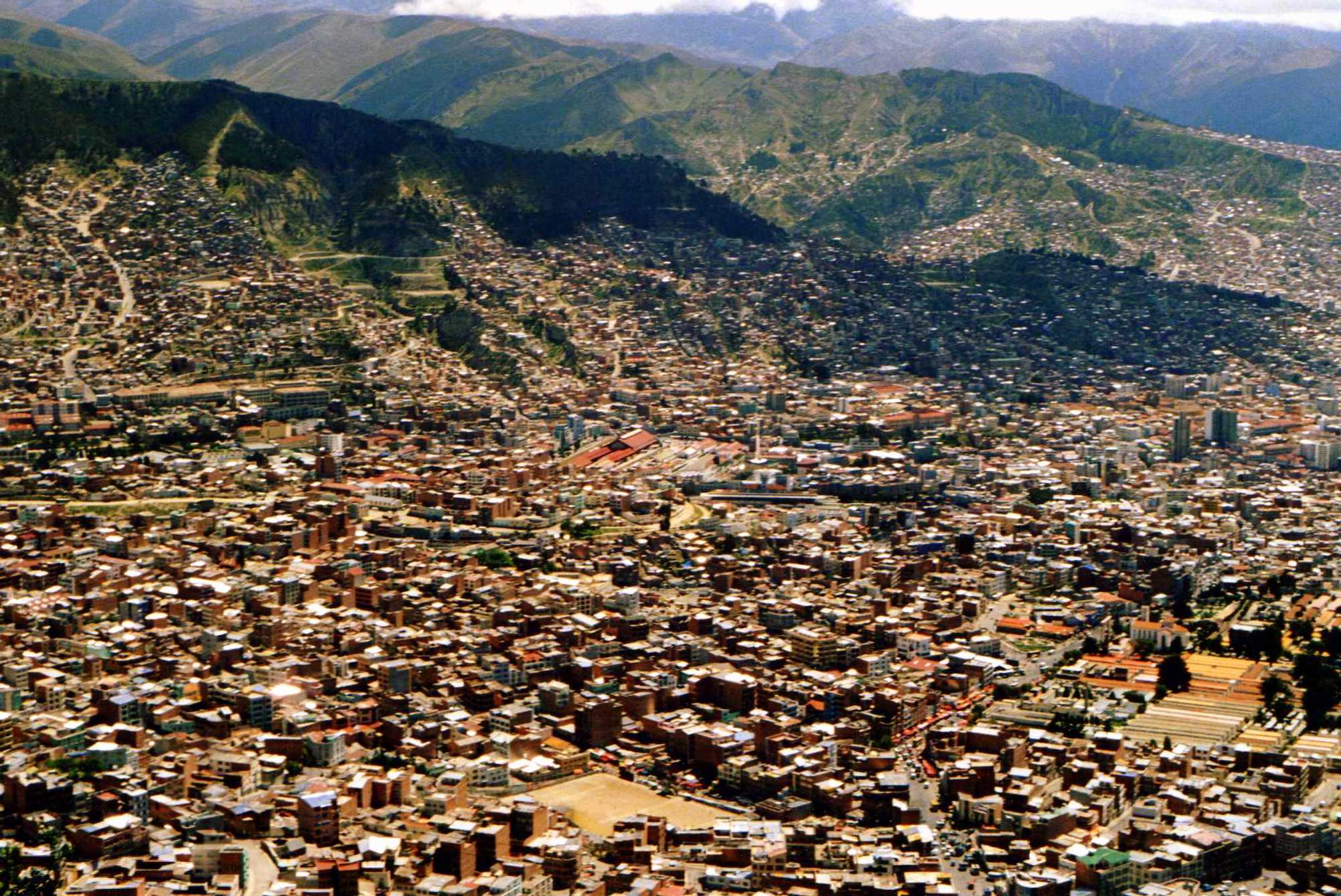 La Paz desde el camino a El Alto, Bolivia